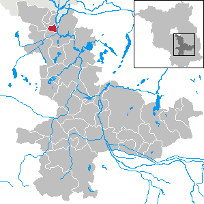 Wildau in Brandenburg (Country) - District Dahme-Spreewald